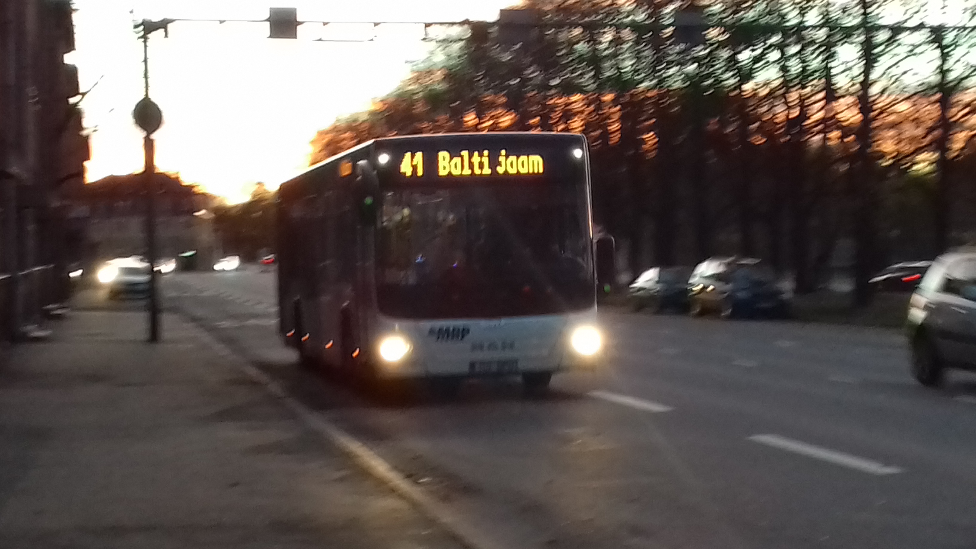 41. bussiliin Paldiski maanteel